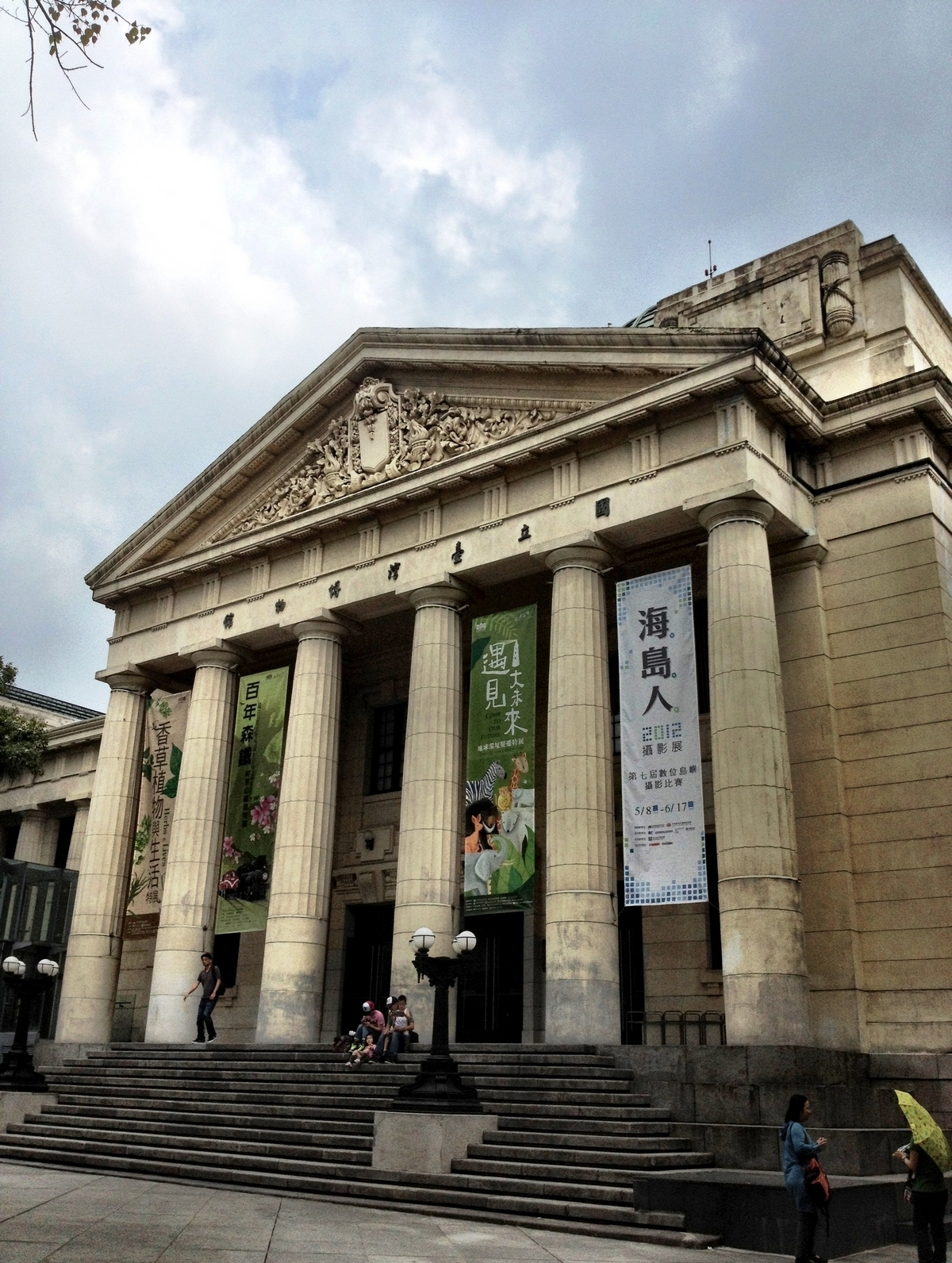 中文（台灣）: 成立於1899年